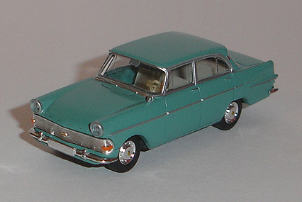 Automodell des Herstellers Brekina, darstellend einen Opel Rekord P2